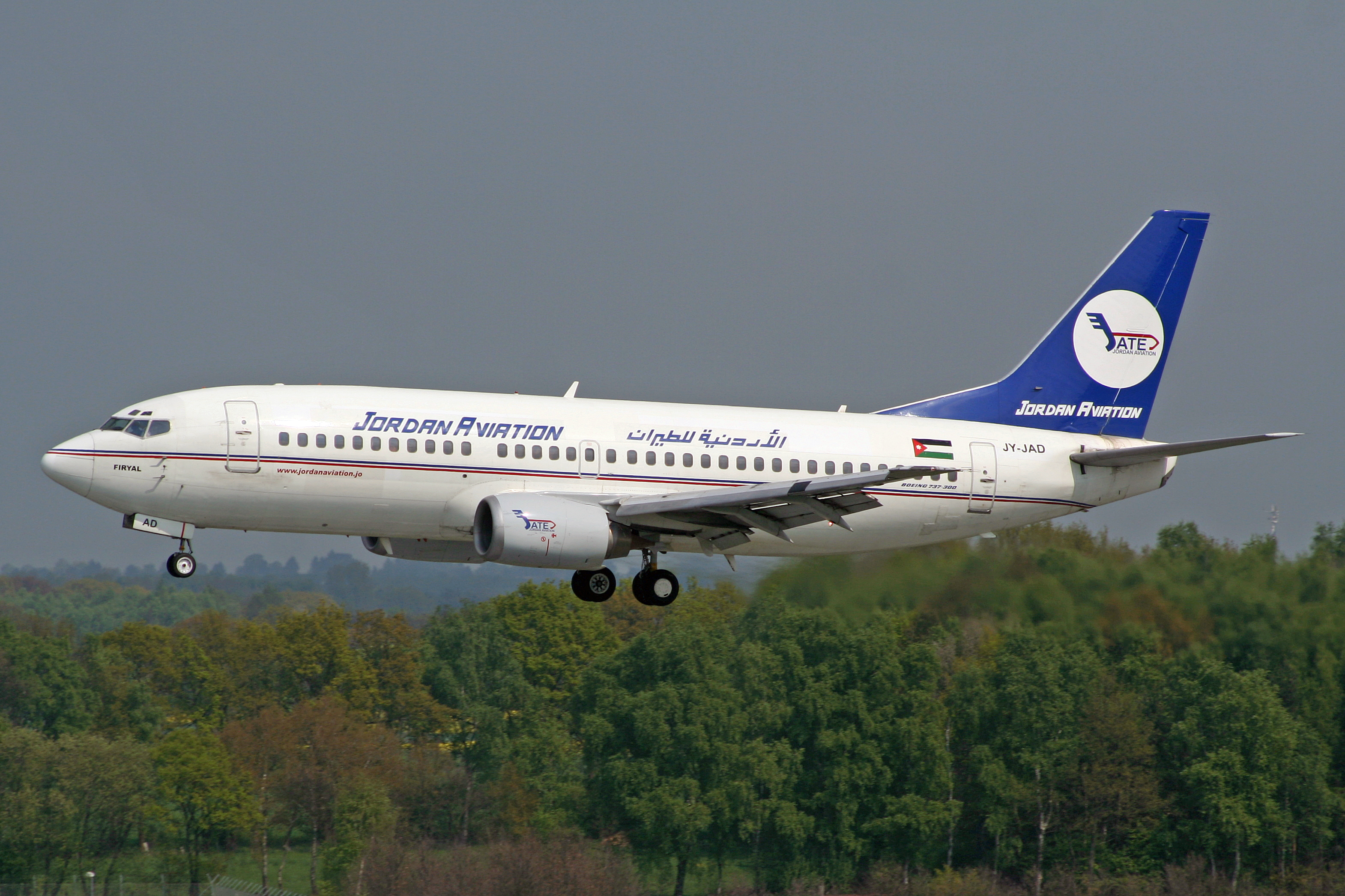 Boeing 737-322 Jordan Aviation JY-JAD @ Haj / Eddv